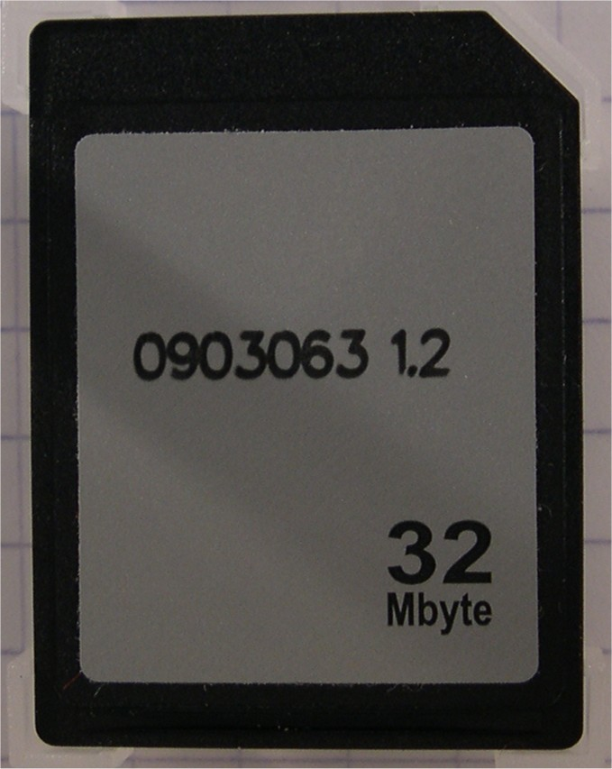 Photo de l'avant d'une carte MMC (j'en suis l'auteur)